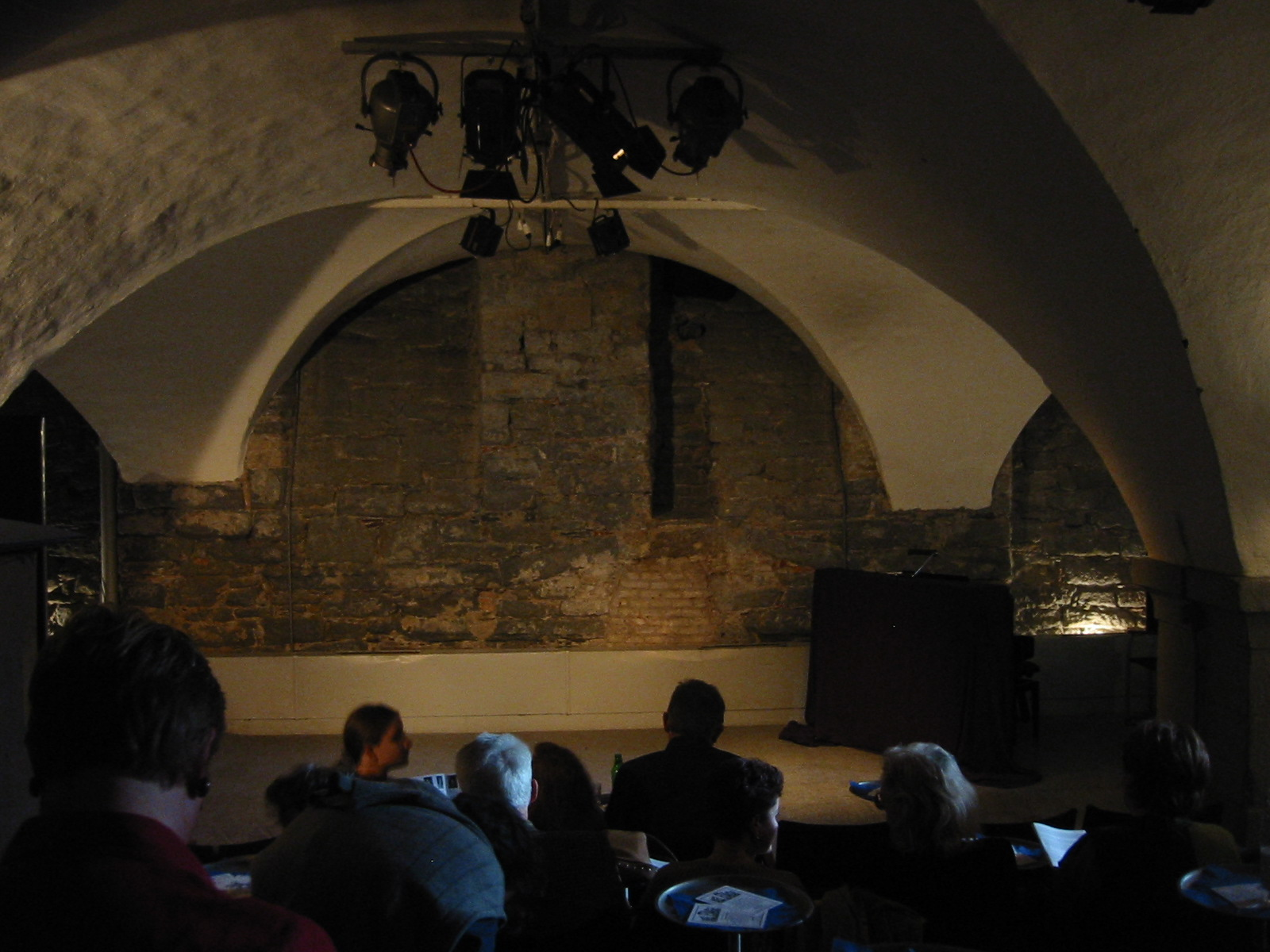 Theater STOK, Hirschengraben 42 (Haus zum Krönli), Zürich (B-Objekt)